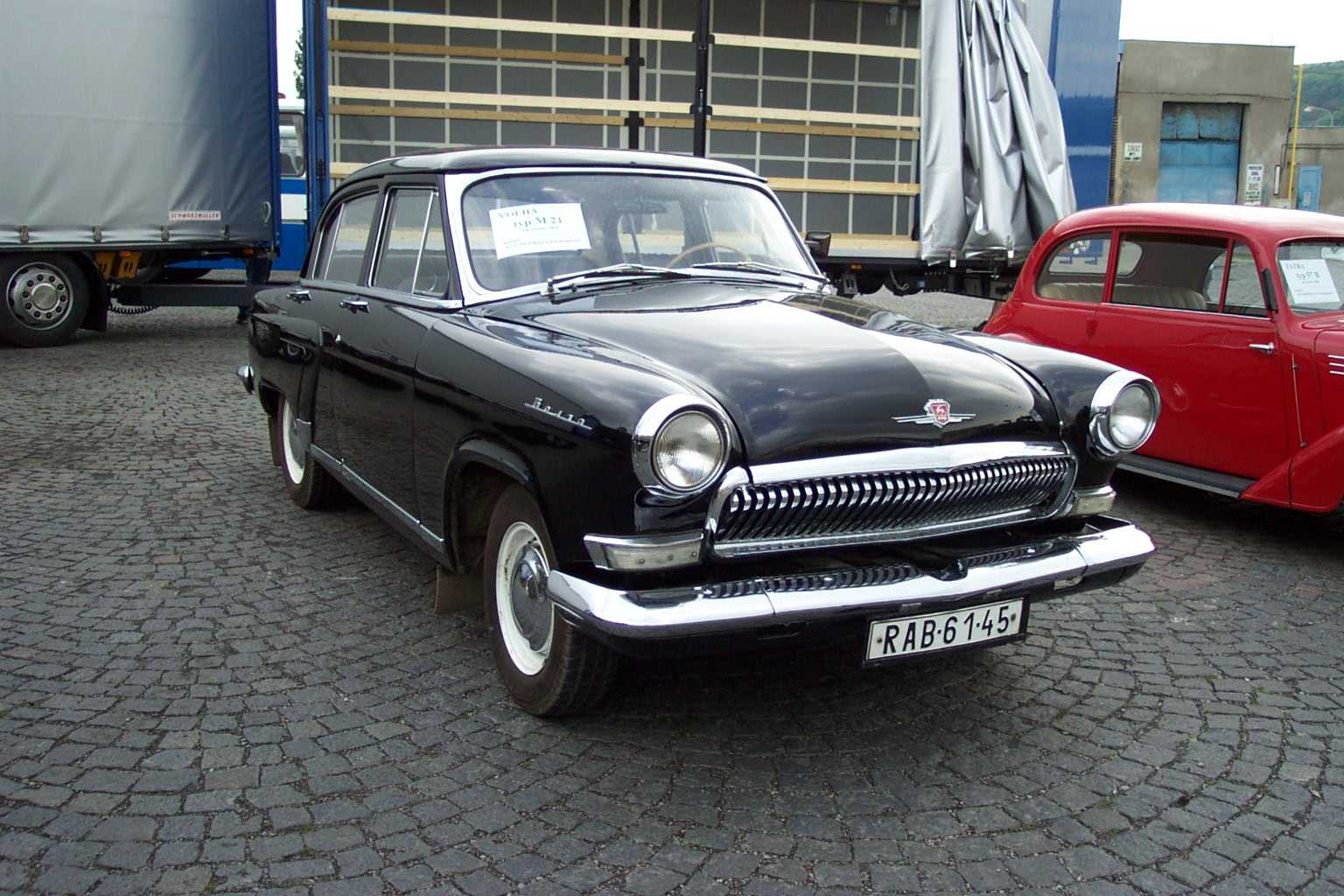 Automobile type Volga M 21 at opened days door in Beroun - automobil typu Volha M 21 vystavený na Dni otevřených dveří v Berouně